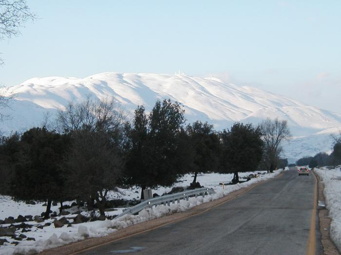 The way to Mt. Hermon